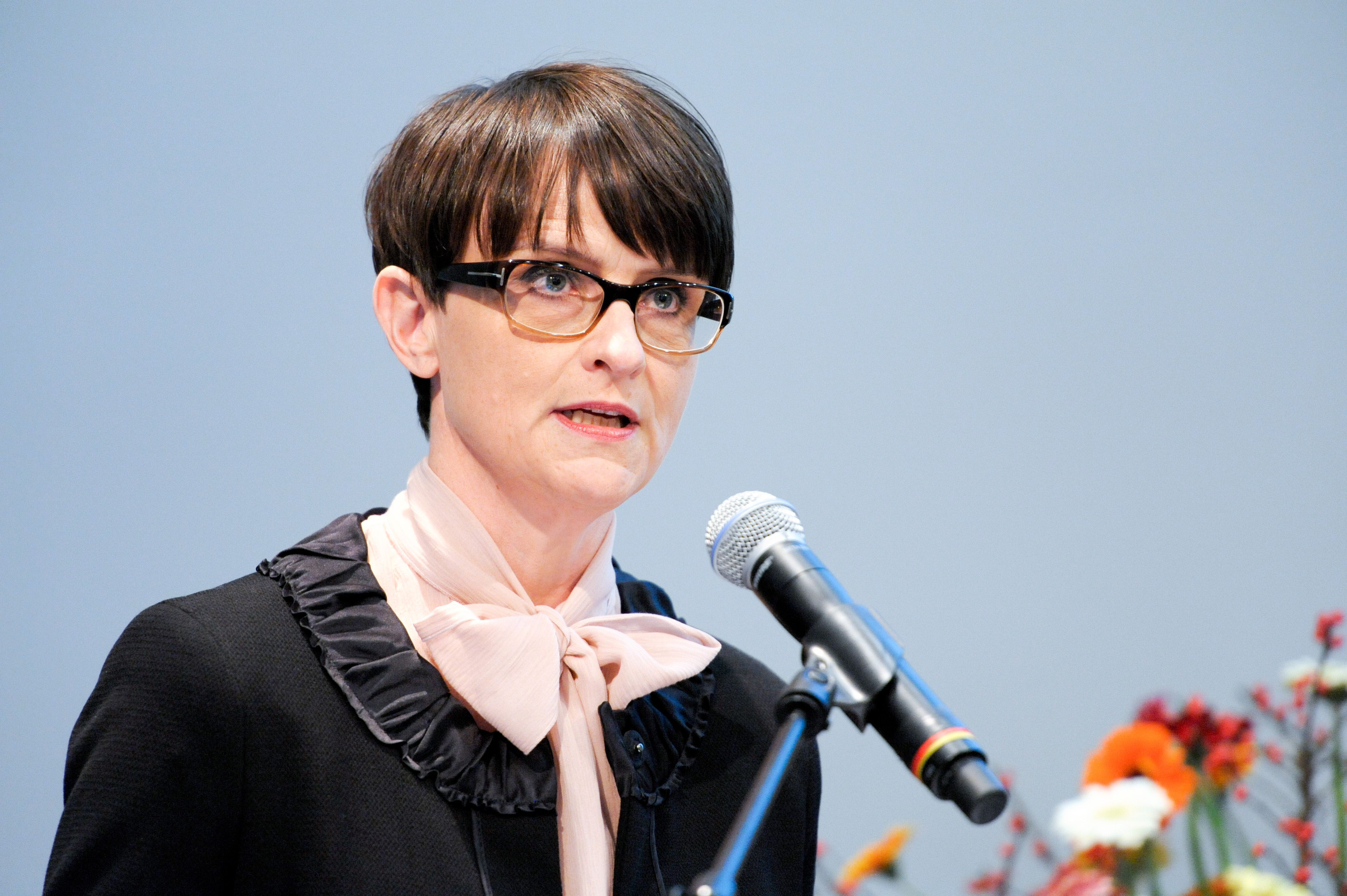 Ragna Árnadóttir, tidigare justitieminister Island.Konferens om lagstiftningssamarbete i Norden 16-17 november 2010.